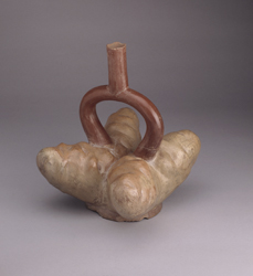 Cerámica Mochica con representación de papa. Museo Larco.